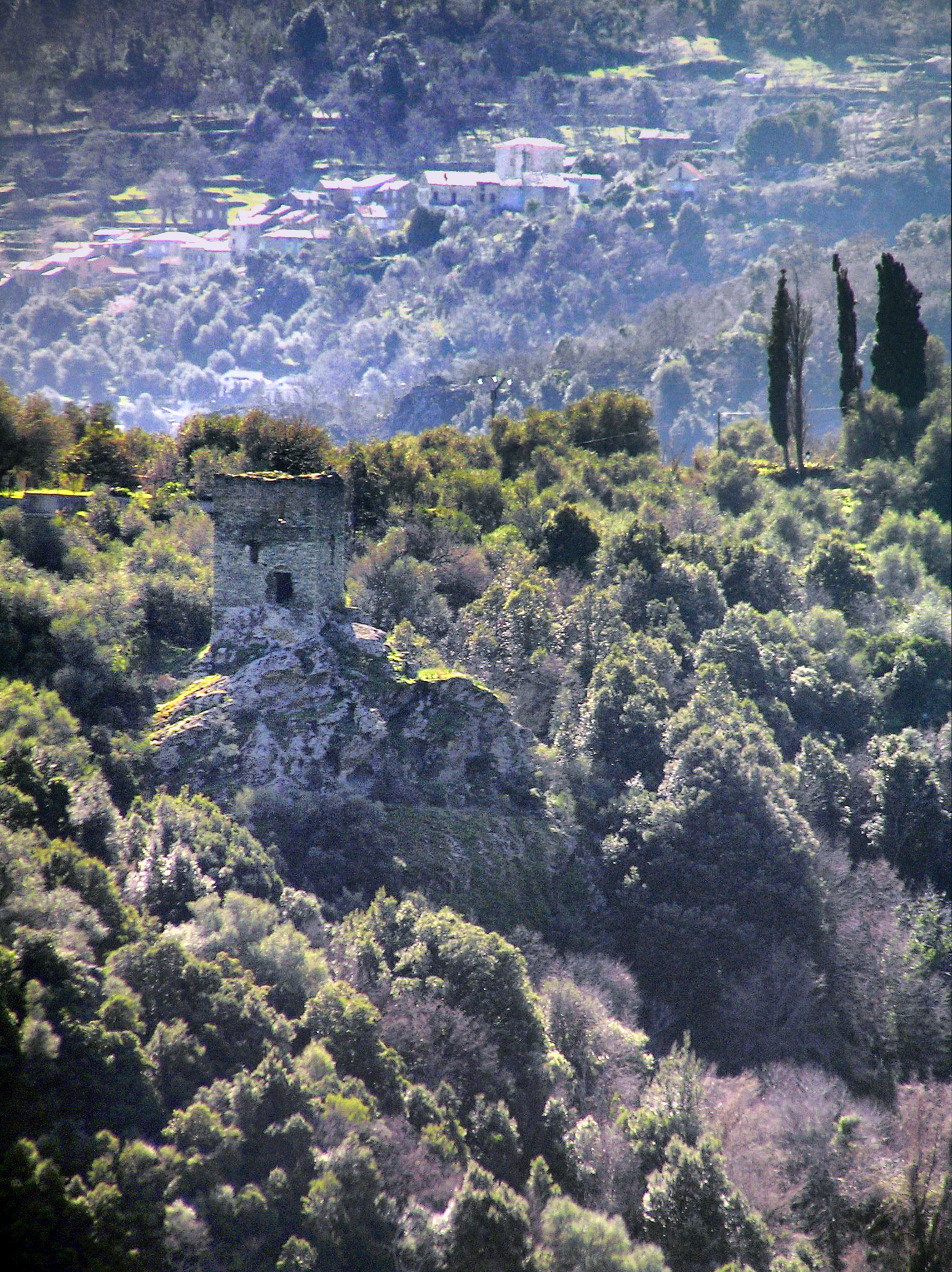 San-Gavino-di-Tenda, Nebbio (Corse) - Tour génoise ruinée à Ombria, au nord de la Cappella di l'Annunciata